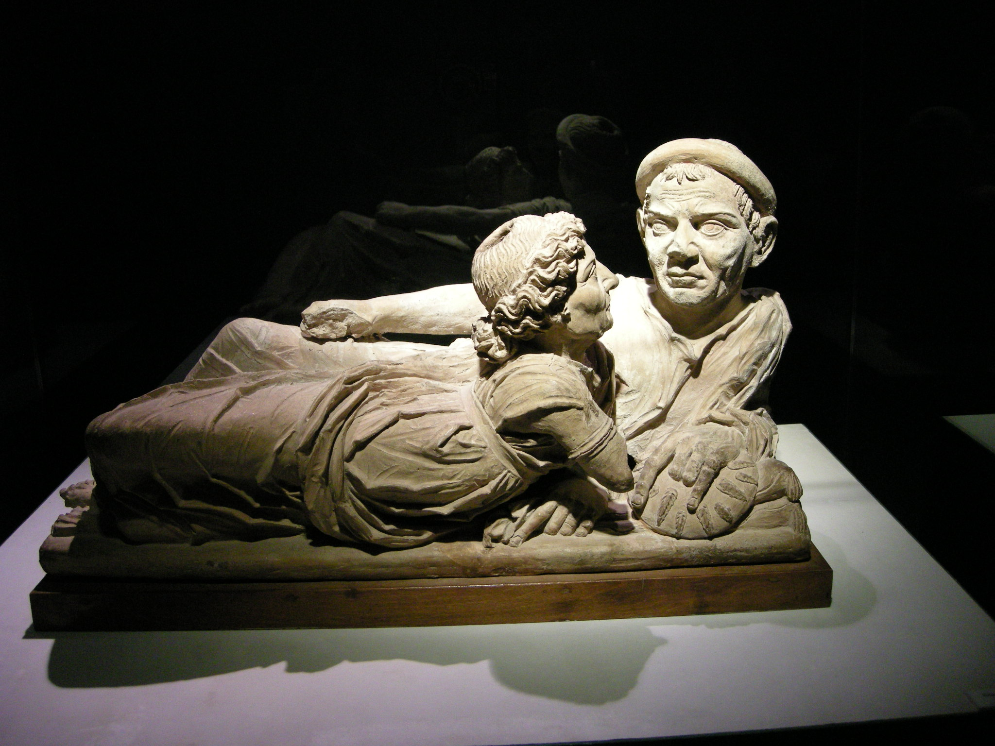 Museo guarnacci, urna degli sposi, I sec. ac.